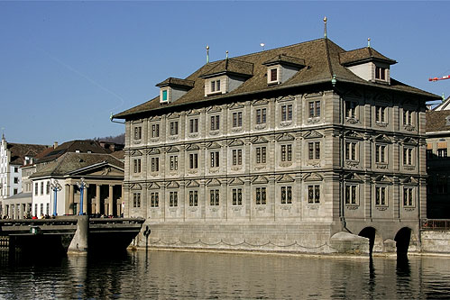 Rathaus in Zürich